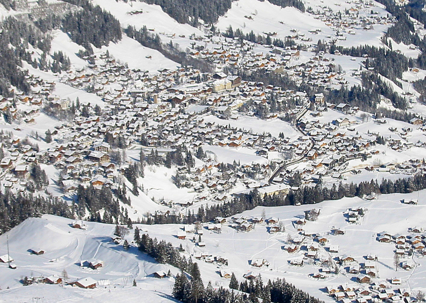 Adelboden vom Kuonisbergli aus gesehen, Februar 2005 Fotografiert von Benutzer:Filzstift mit einer Billigkamera und leicht nachbearbeitet 14:15, 11. Mär 2005 Filzstift 1423 x 1015 (774789 Byte)